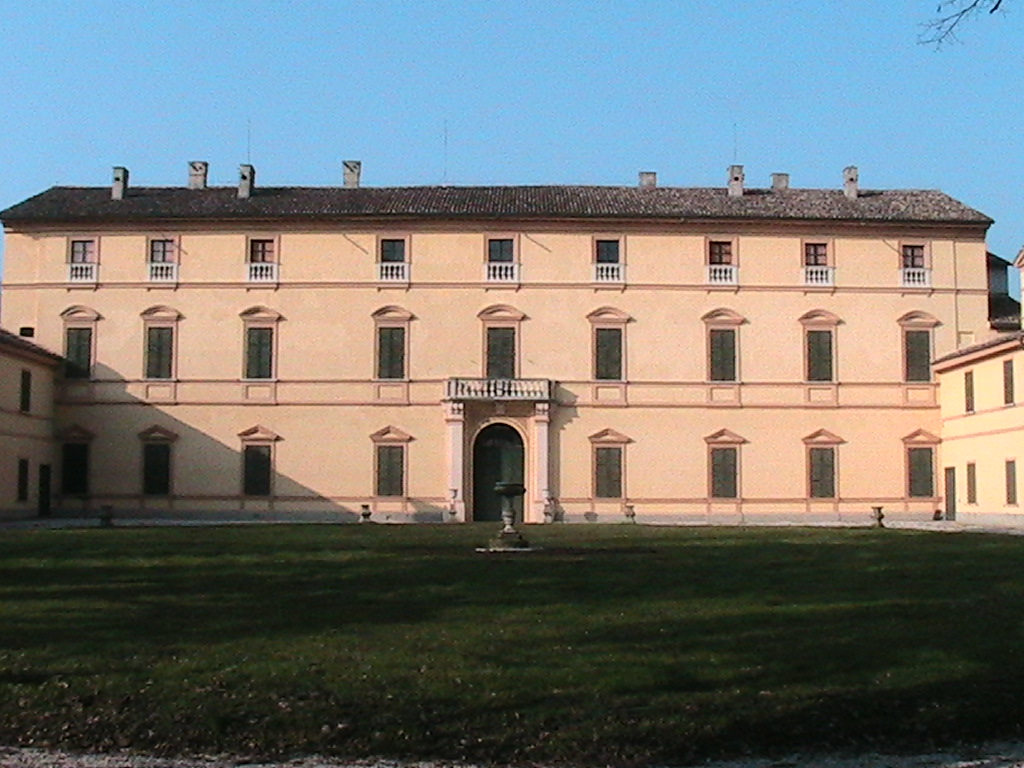 Spineda (Cr) - Villa Cavalcabo'